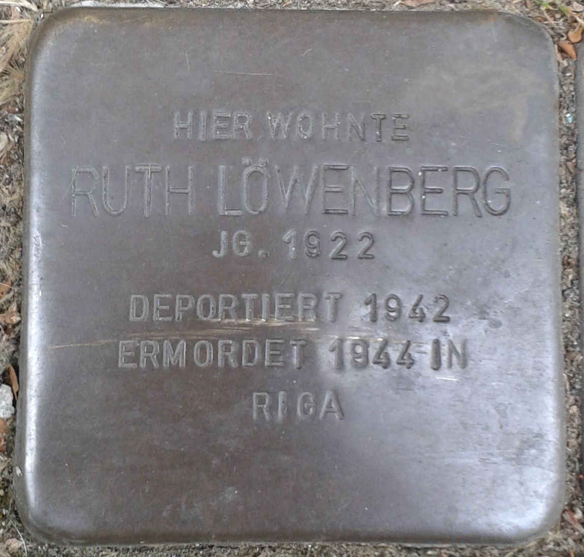 Stolperstein Datteln Marktstraße 5 Ruth Löwenberg